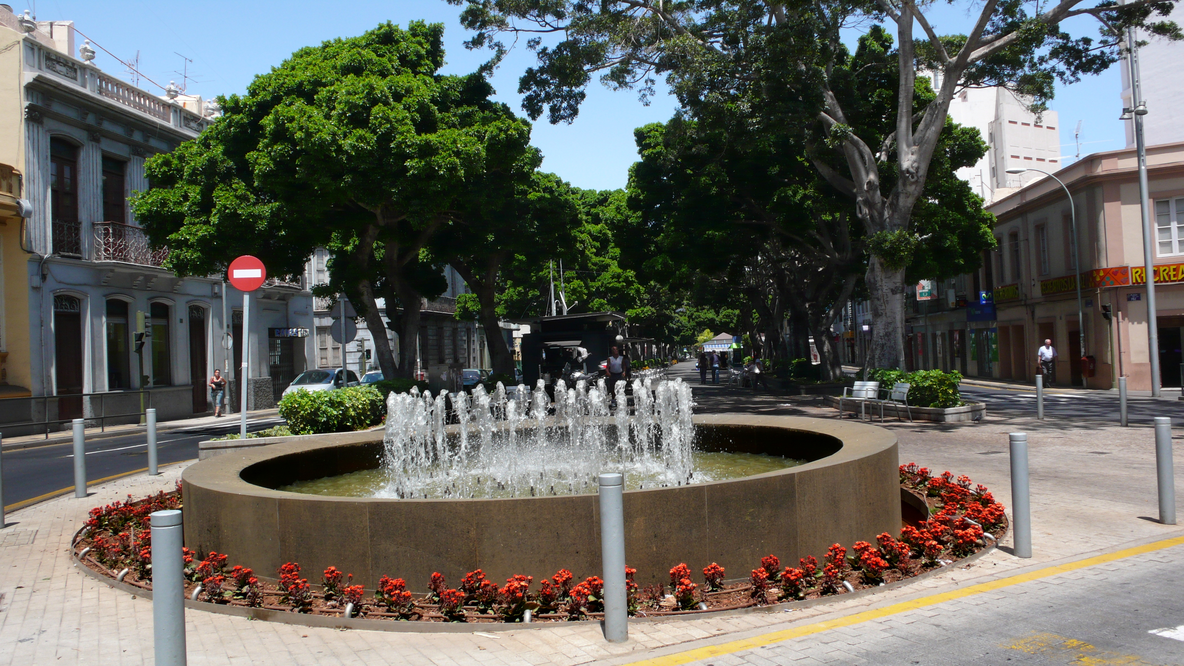 Plaza de la Paz, Santa Cruz de Tenerife: fuente y ramblas.